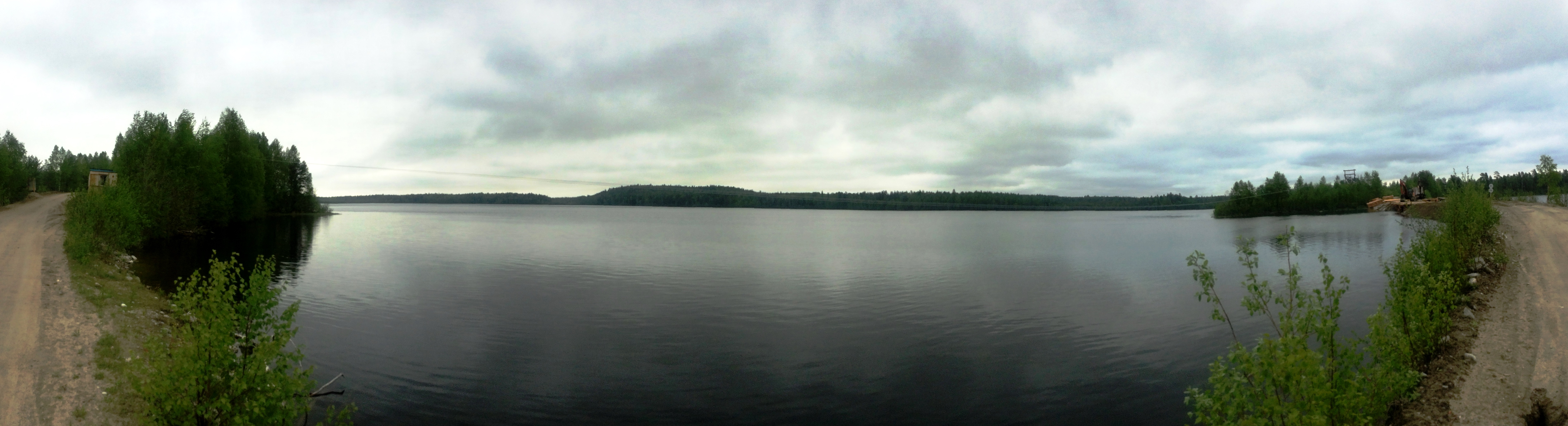 Чурозеро (озеро, Карелия)